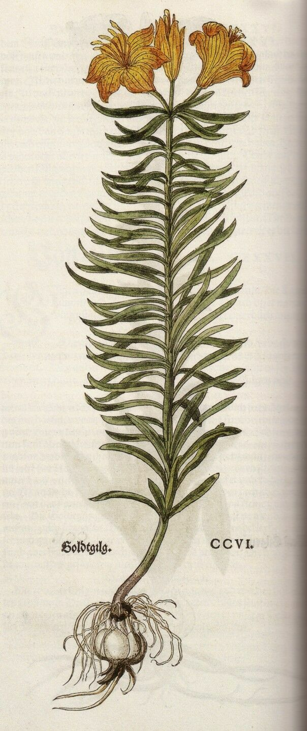 Goldtgilg = Lilium bulbiferum, Table CCVI